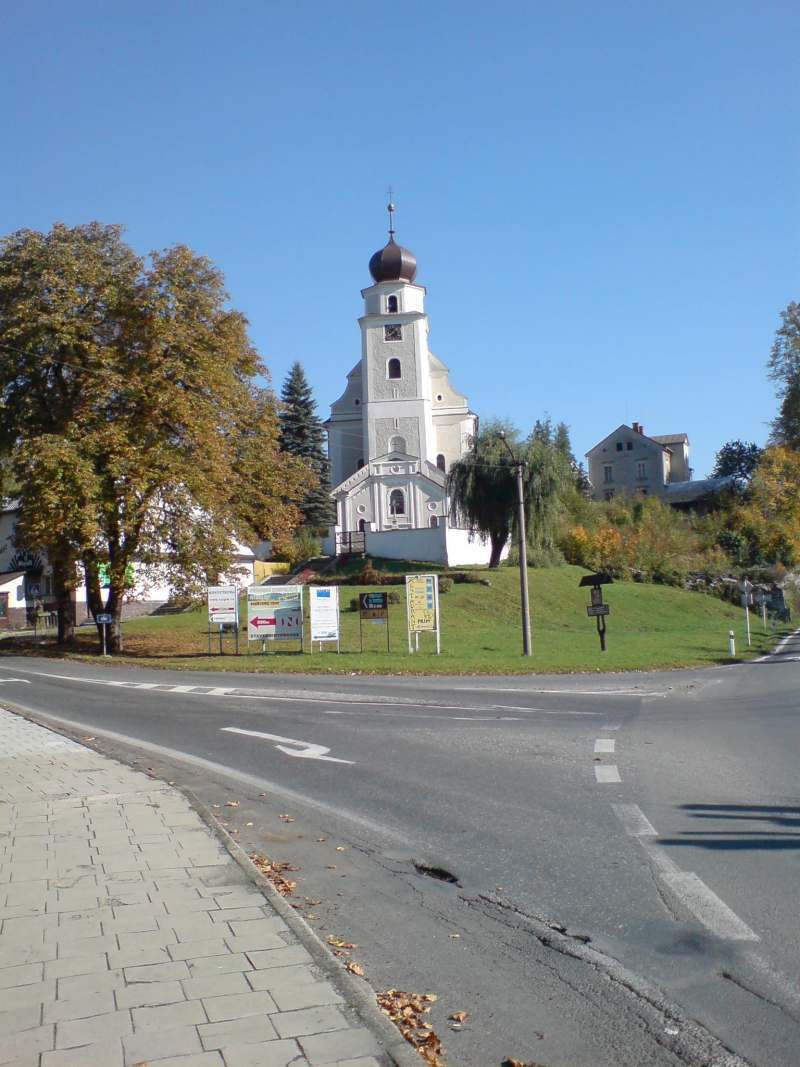 Písečná u Jeseníku kostel